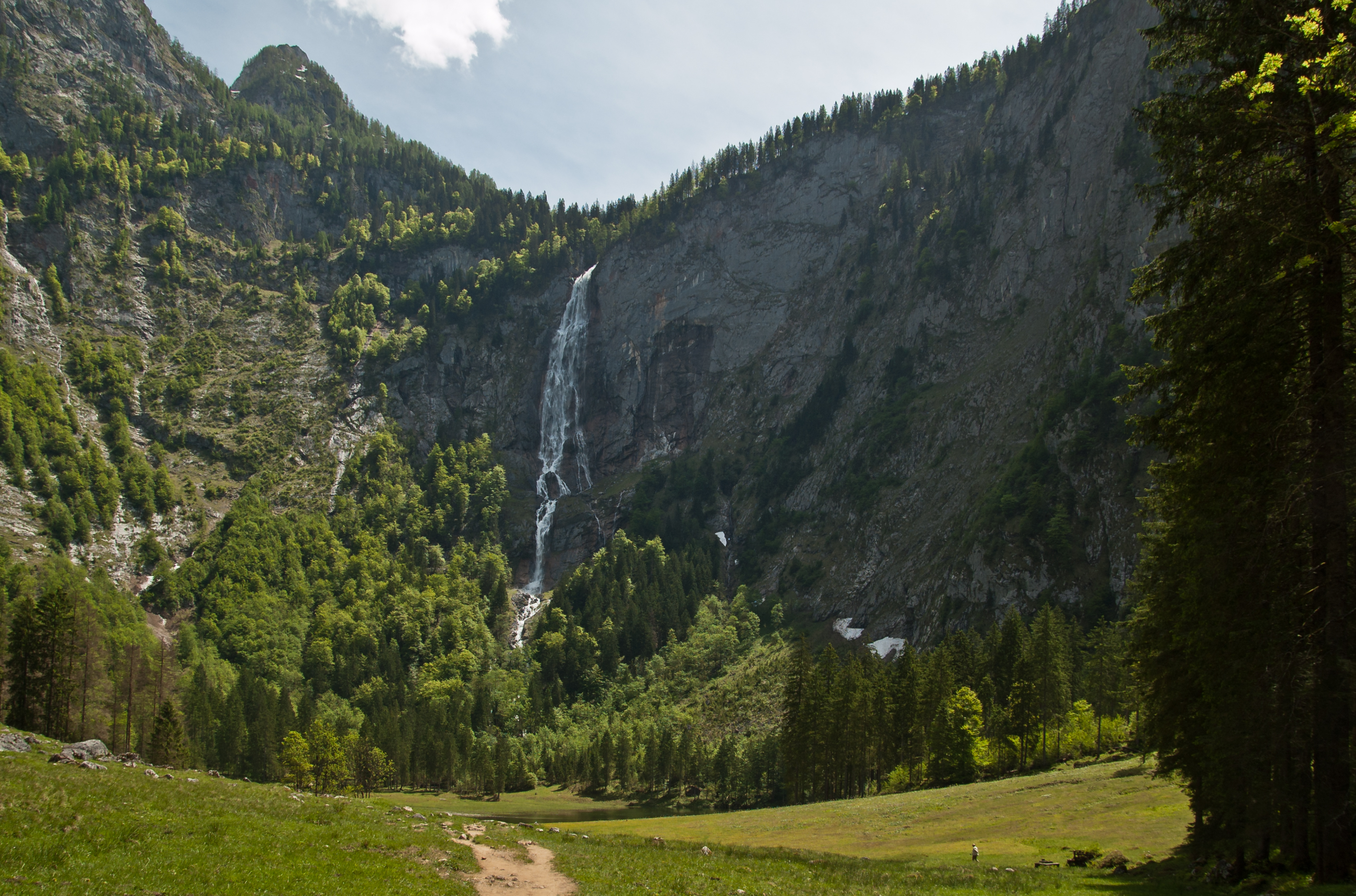 Der Röthbachwasserfall oberhalb der Fischunkelalm